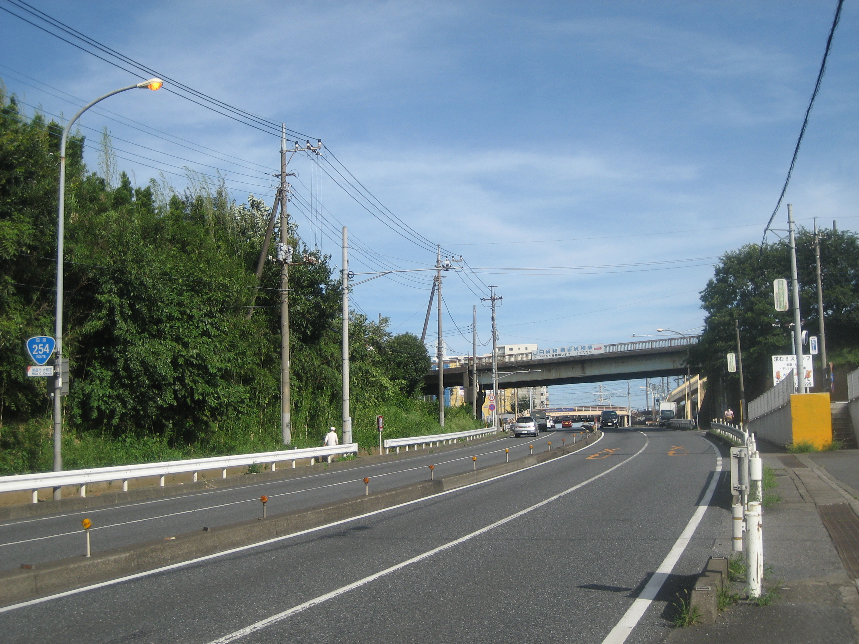 国道254号線埼玉県新座市新座貨物ターミナル付近（池袋方面を撮影）